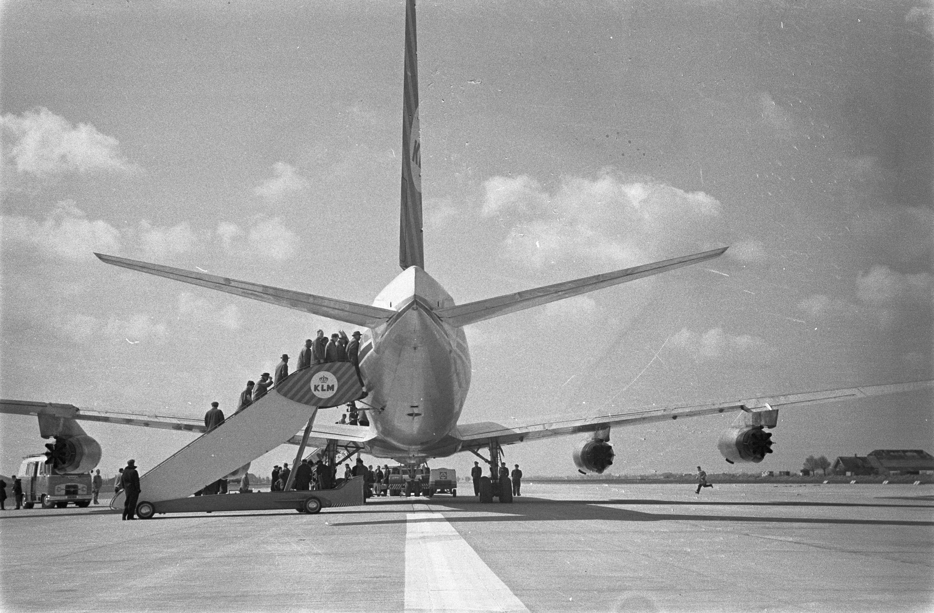 Ingebruikname startbaan 06-24 (3.300 m lang) op Schiphol het aan boord gaan van de genodigden. Location: Amsterdam, Noord-Holland